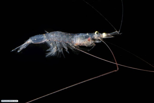 Camarão Sergestidae